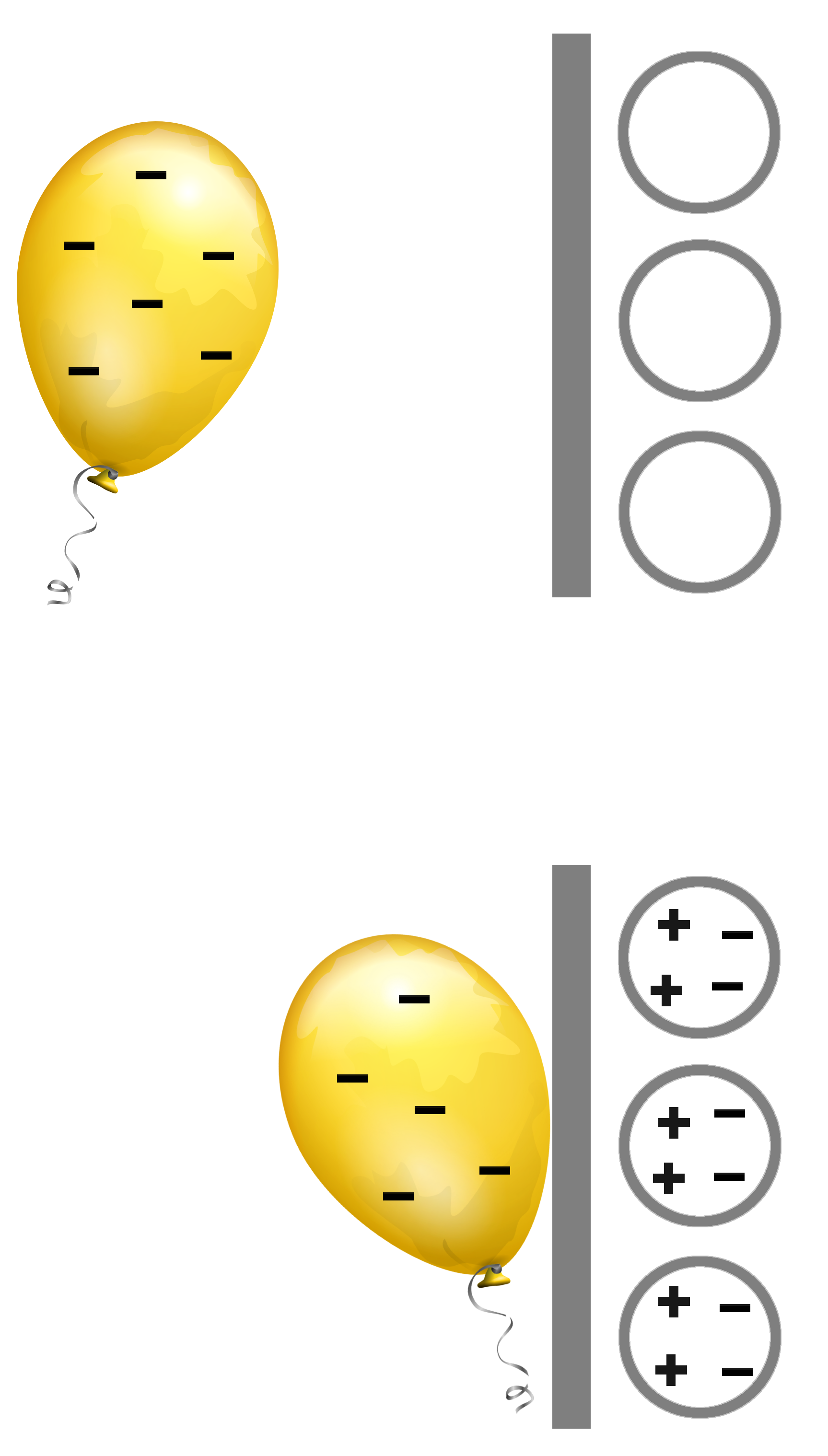 En leketøysballong blir negativt elektrisk ladet når den gnis mot f.eks. hår. Når en slik elektrisk ladet ballong kommer nær en elektrisk nøytral gjenstand, for eksempel en vegg, vil de elektriske ladningene i veggen flytte seg omtrent slik figuren viser, slik at ballongen og veggen tiltrekkes av hverandre.